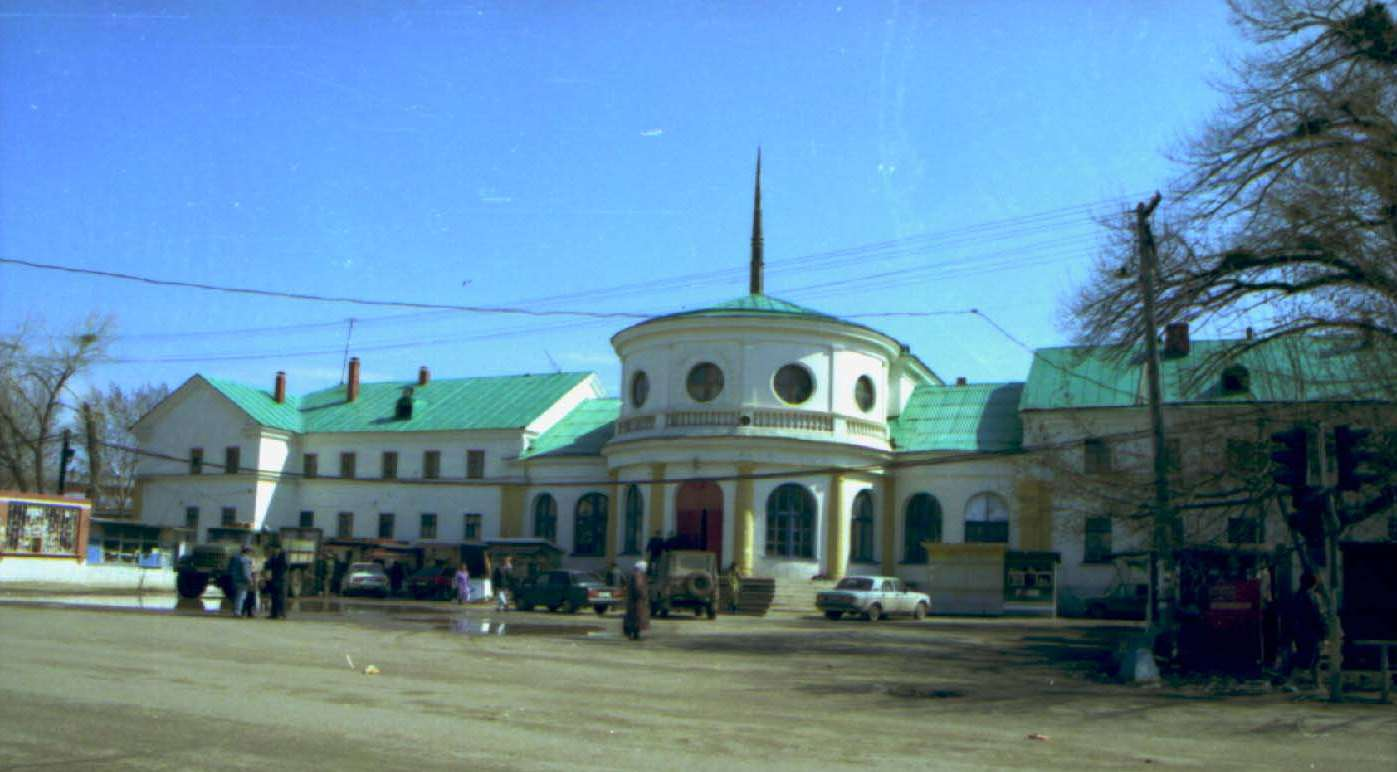 Вокзал города Фролово. Вид на автобусный вокзал, сзади - железнодорожный.